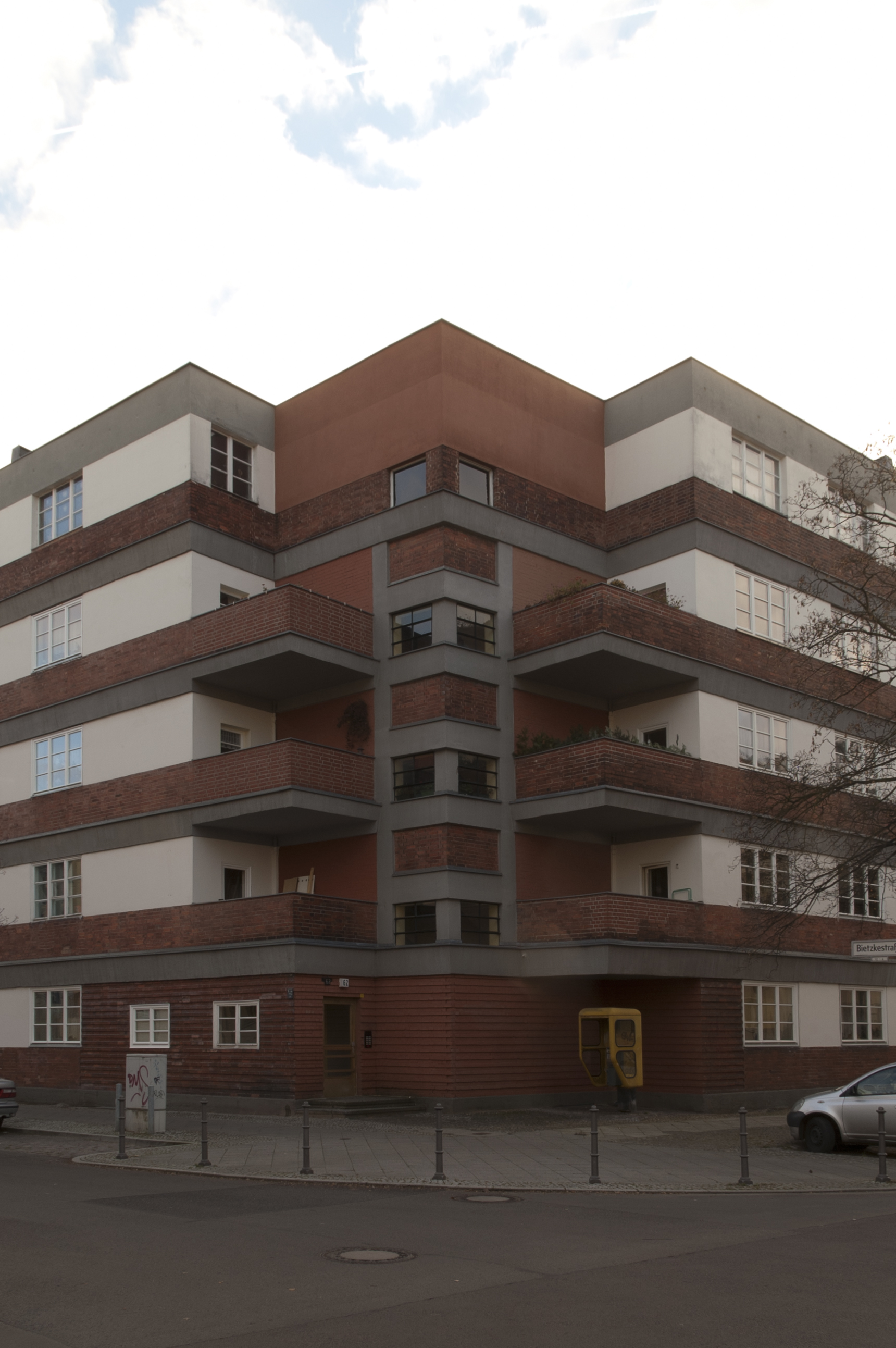 „Sonnenhof“, Block von Erwin Anton Gutkind, erbaut 1925-1927